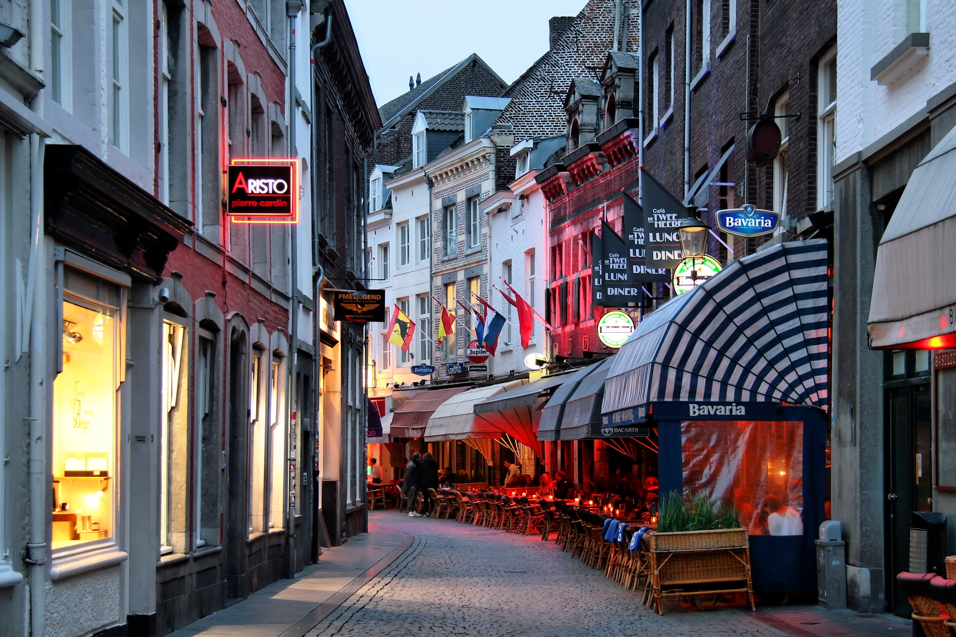 Maastricht